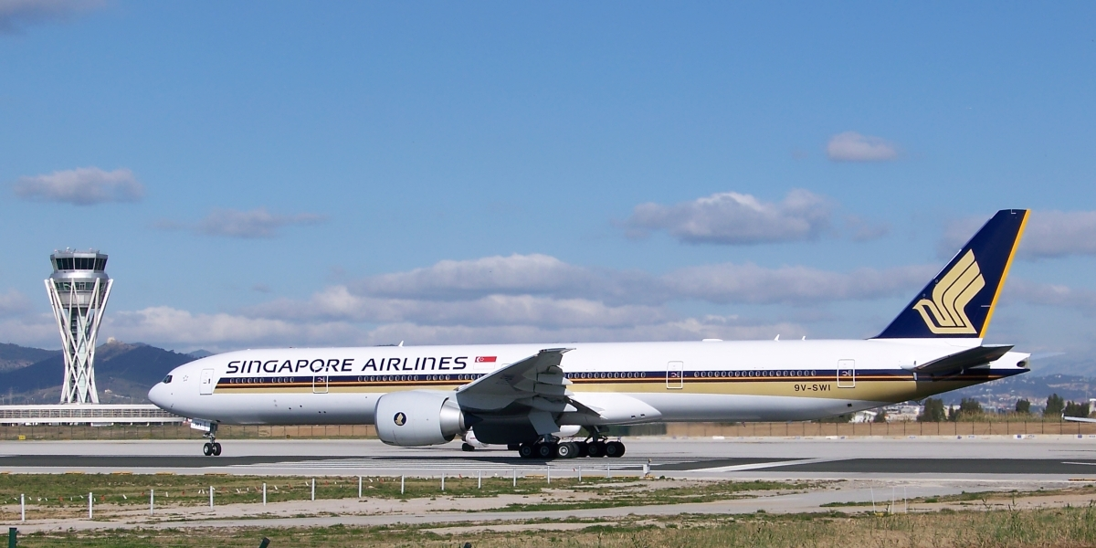 Apunto de iniciar su carrera de despegue. Boeing 777-312ER cn 34574/618. LEBL / BCN 2007 Marzo 24